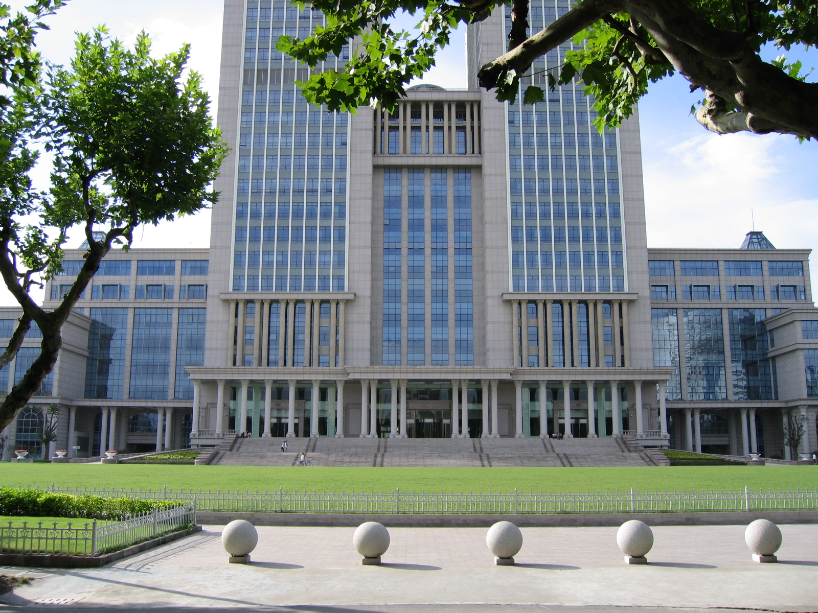 复旦大学光华楼 Guanghua Building, Fudan University, Shanghai, China